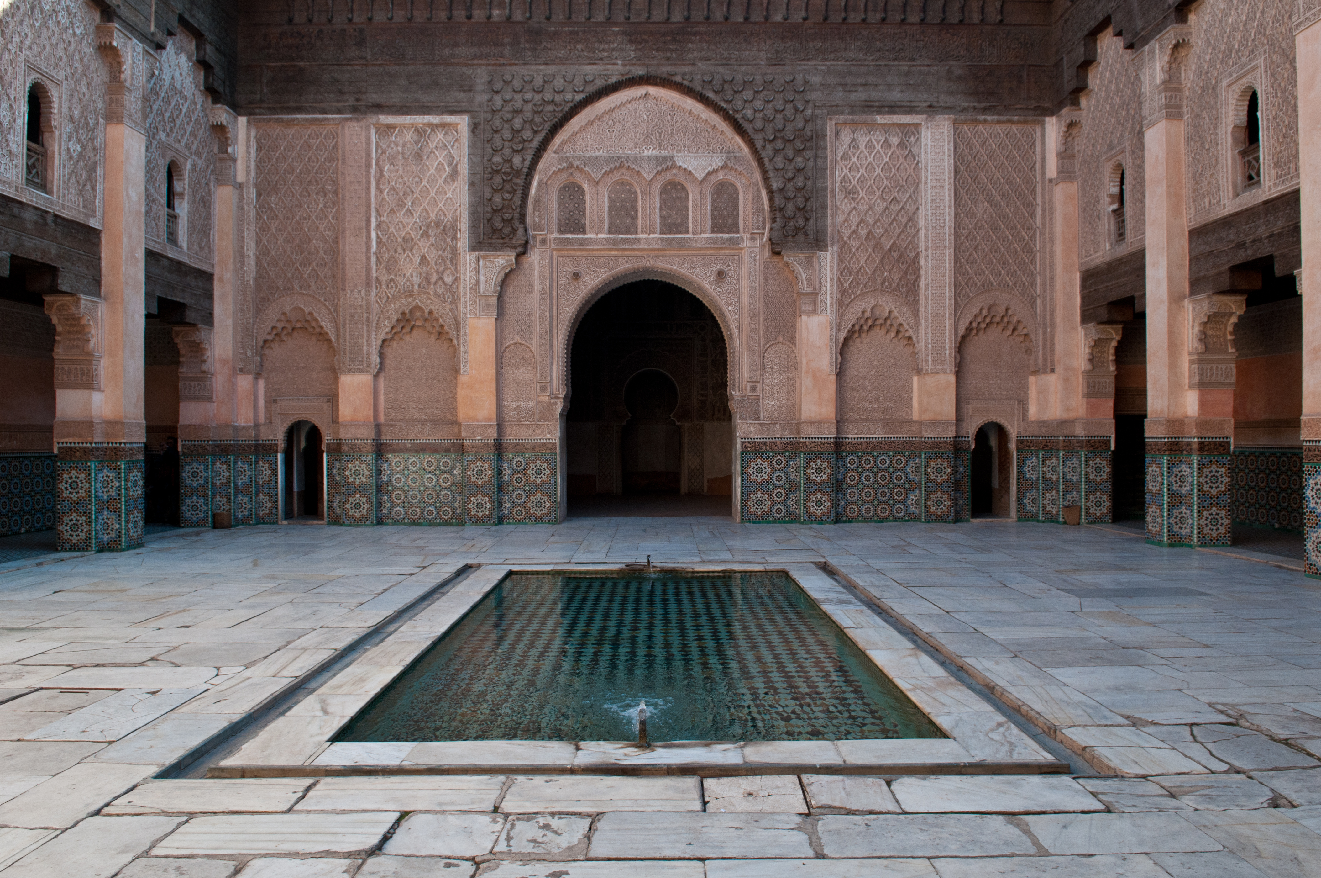 Marrakesh, Ben Youssef Medersa